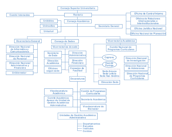 Organigrama de la Universidad Nacional de Colombia